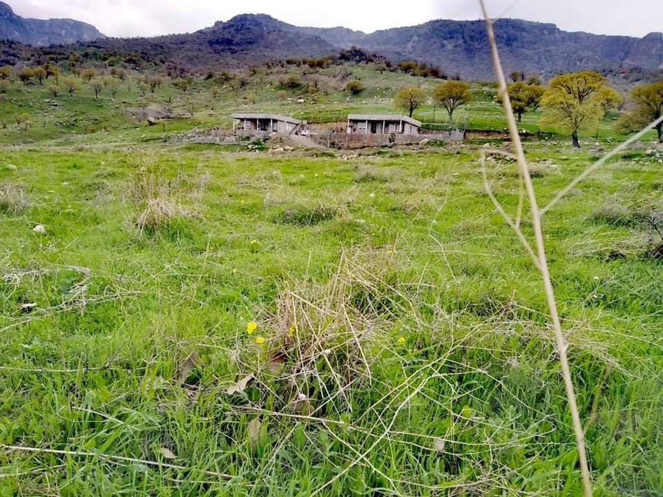 کوردی: گوندی بەلەسۆ